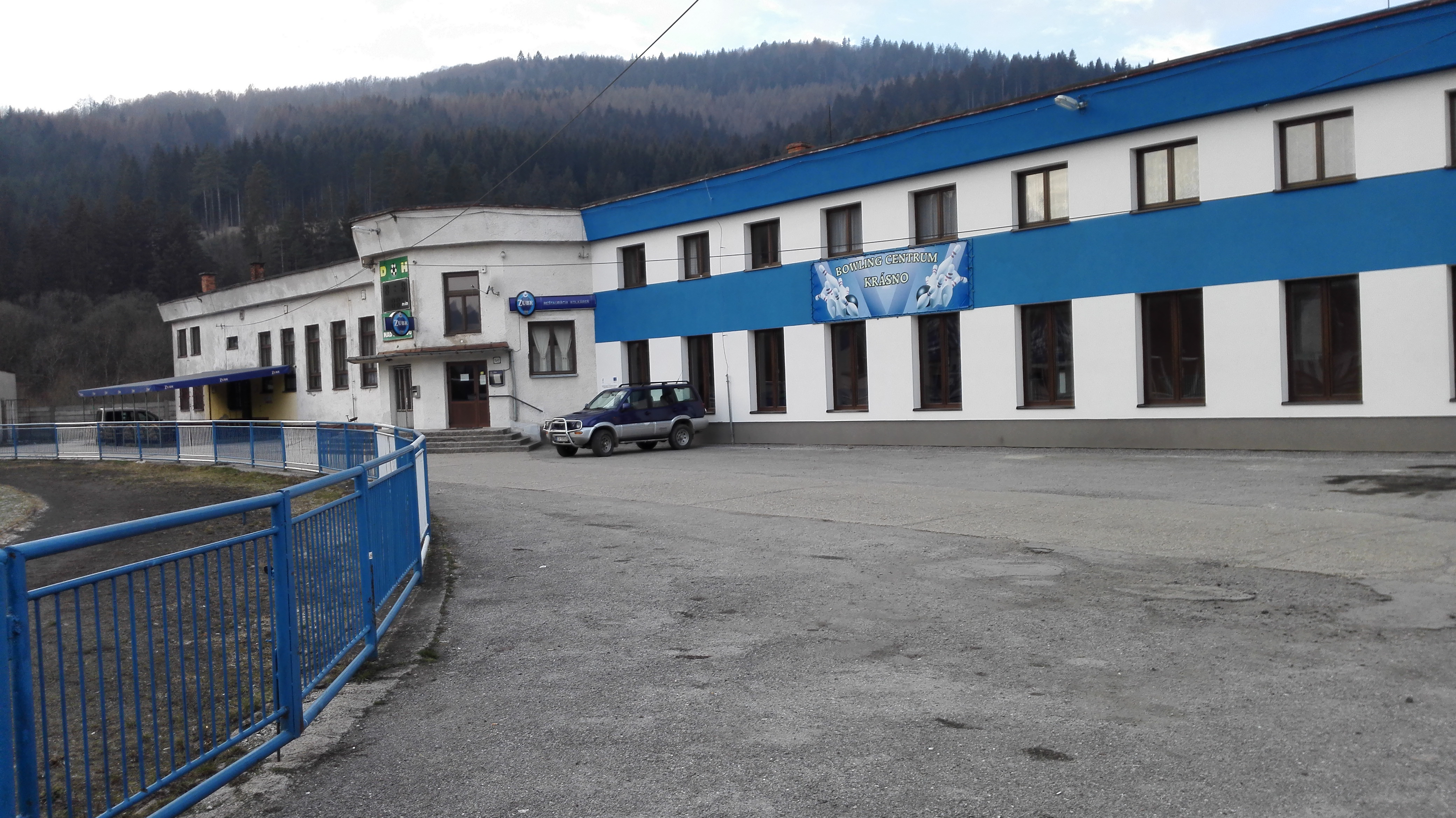 Budova Kolkárne v športovom areáli v Krásne nad Kysucou, vybudovaná v roku 1958.